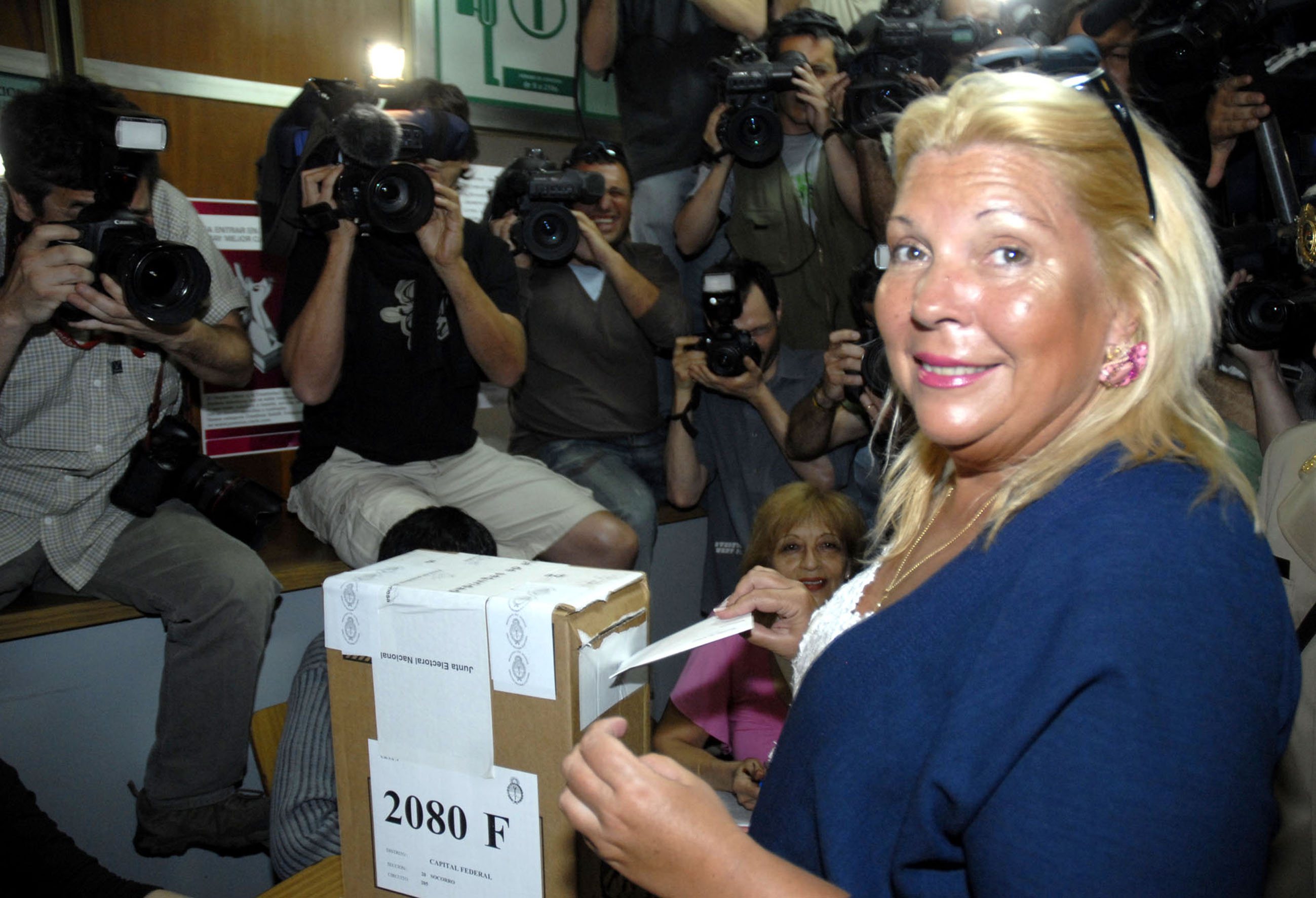 A candidata à Presidência Elisa Carrió vota em bairro próximo ao centro da cidade